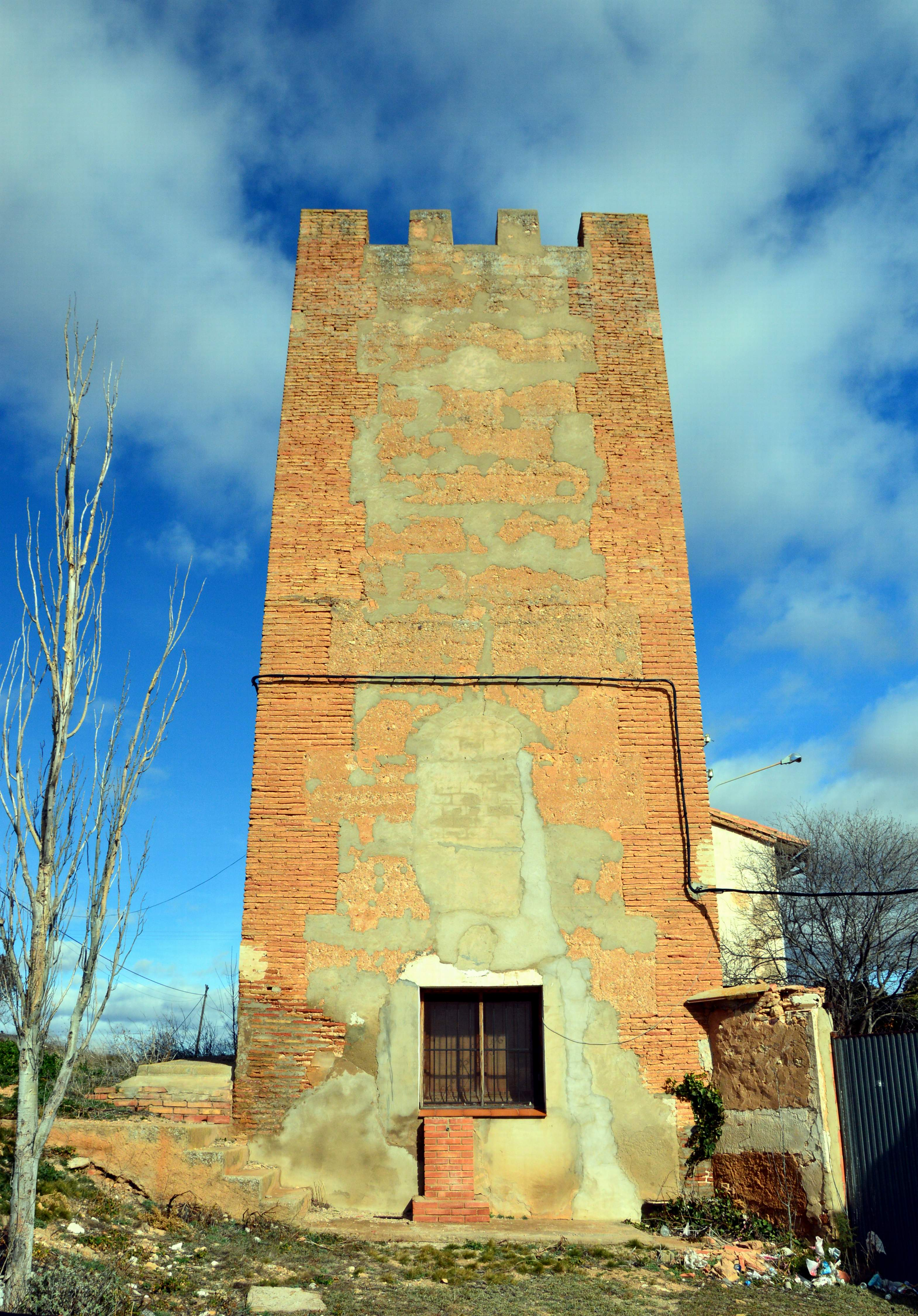 Vista frontal (meridional) de la Torre de Villastar (Teruel), 2019.